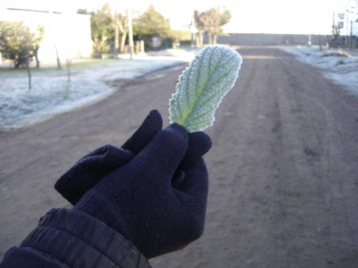 Helada en Bella Union